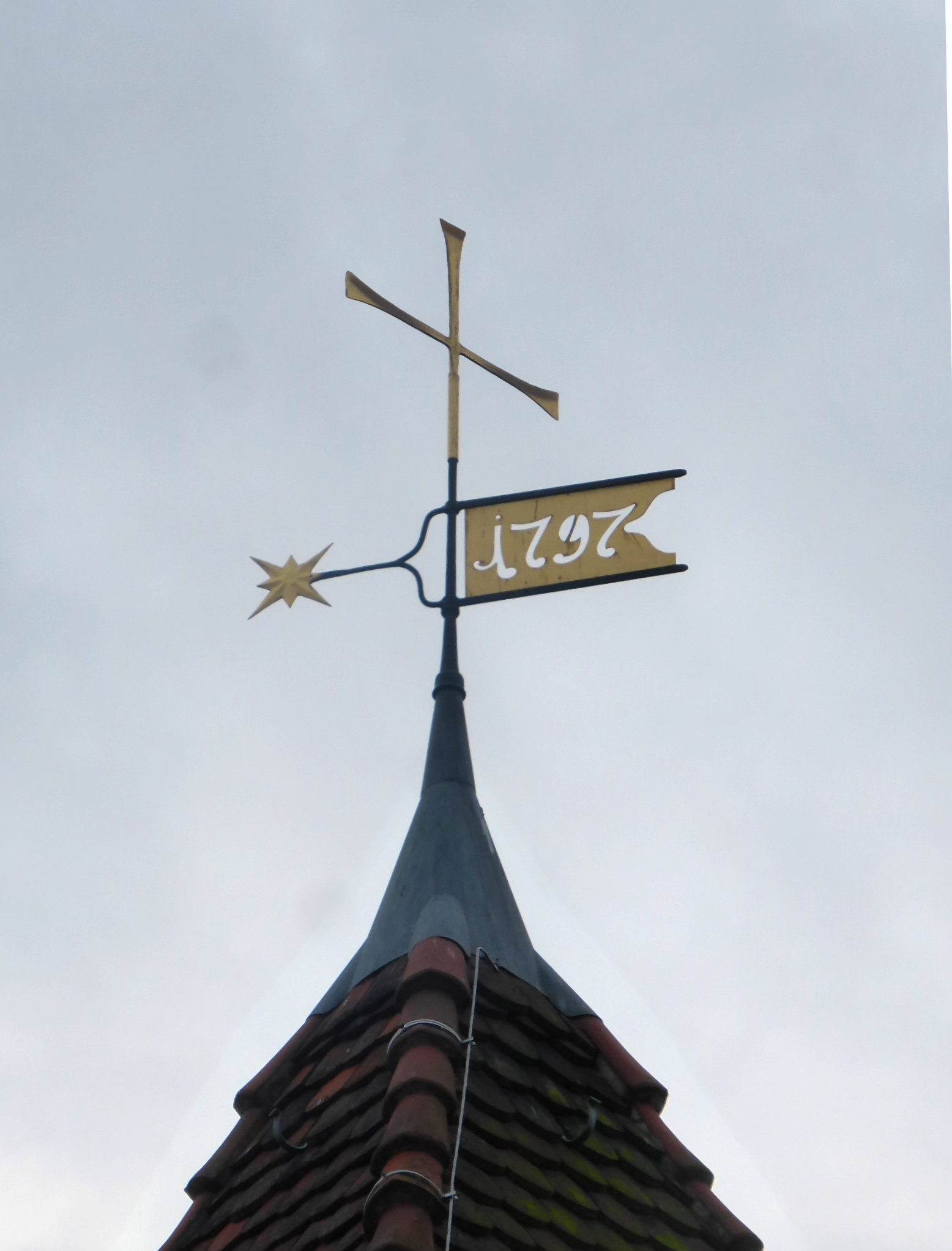 Dorfkirche Paretz, 29.11.2015